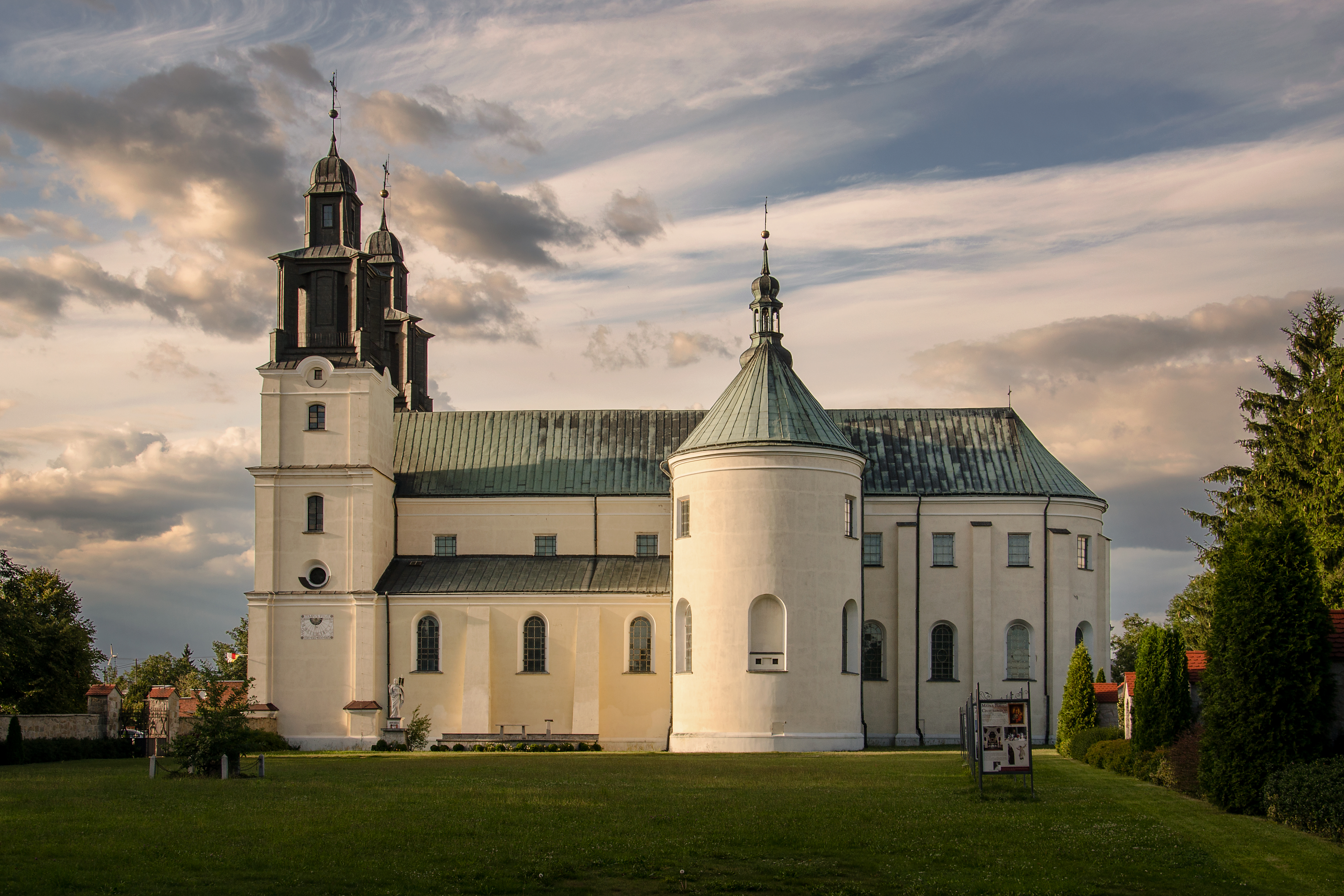 Gidle, kościół p.w. Wniebowzięcia NMP, 1632-1644